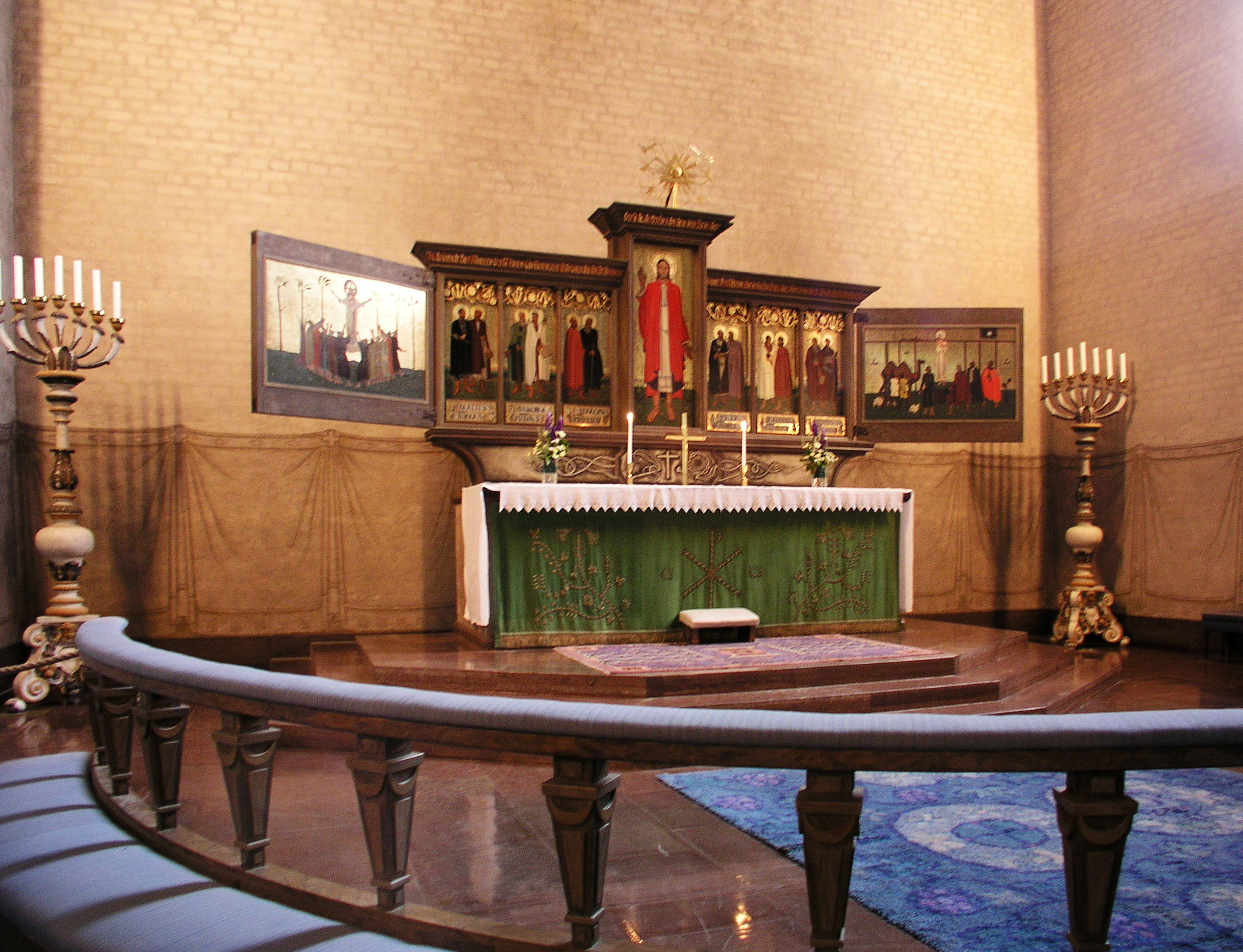 Högalidskyrkan, Diocese of Stockholm, Sweden. Altar.